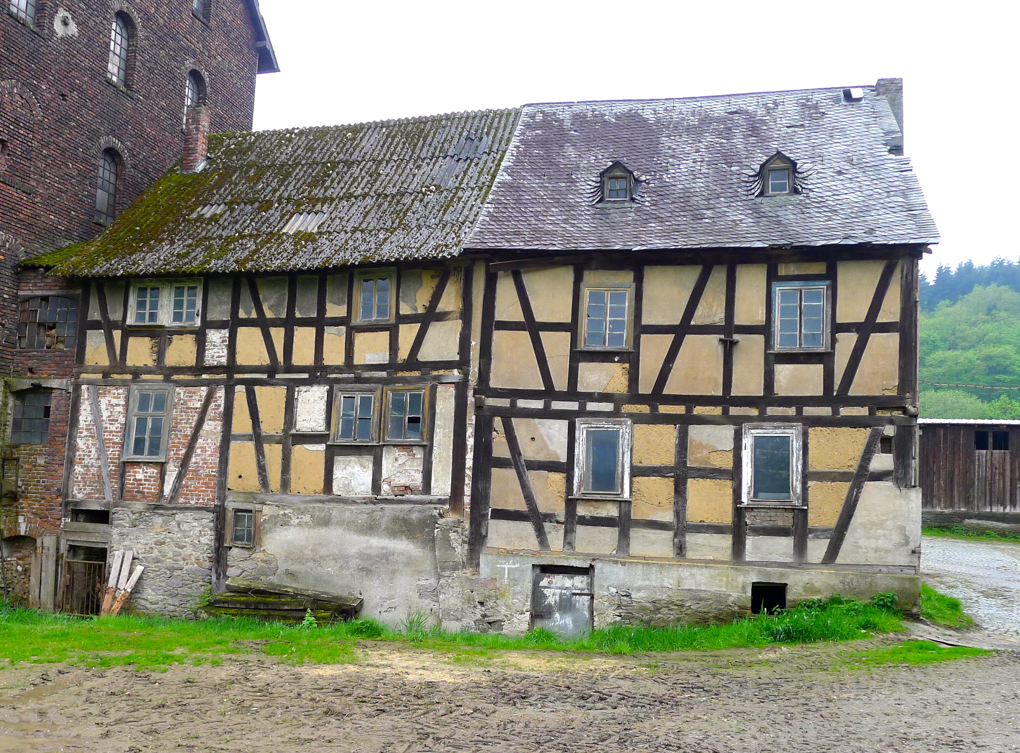 Marxmühle bei Katzenfurt (Teilansicht Wohnhäuser)